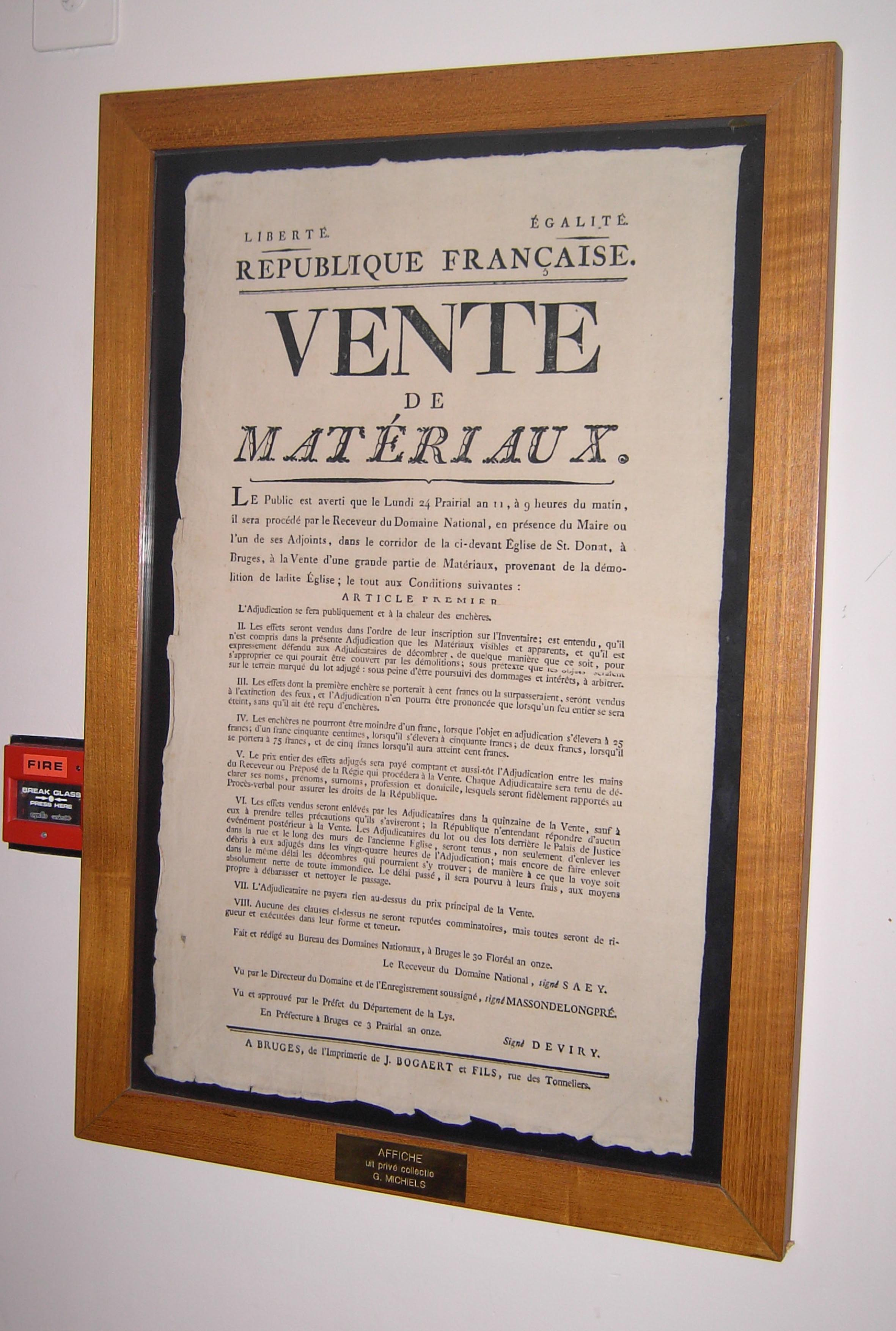 Affiche van de openbare verkoop van materialen, na de afbraak van de Sint-Donaaskathedraal te Brugge - België.